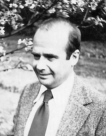 Andrzej Kijowski (1928 - 1985), Dom Aktora w Skolimowie